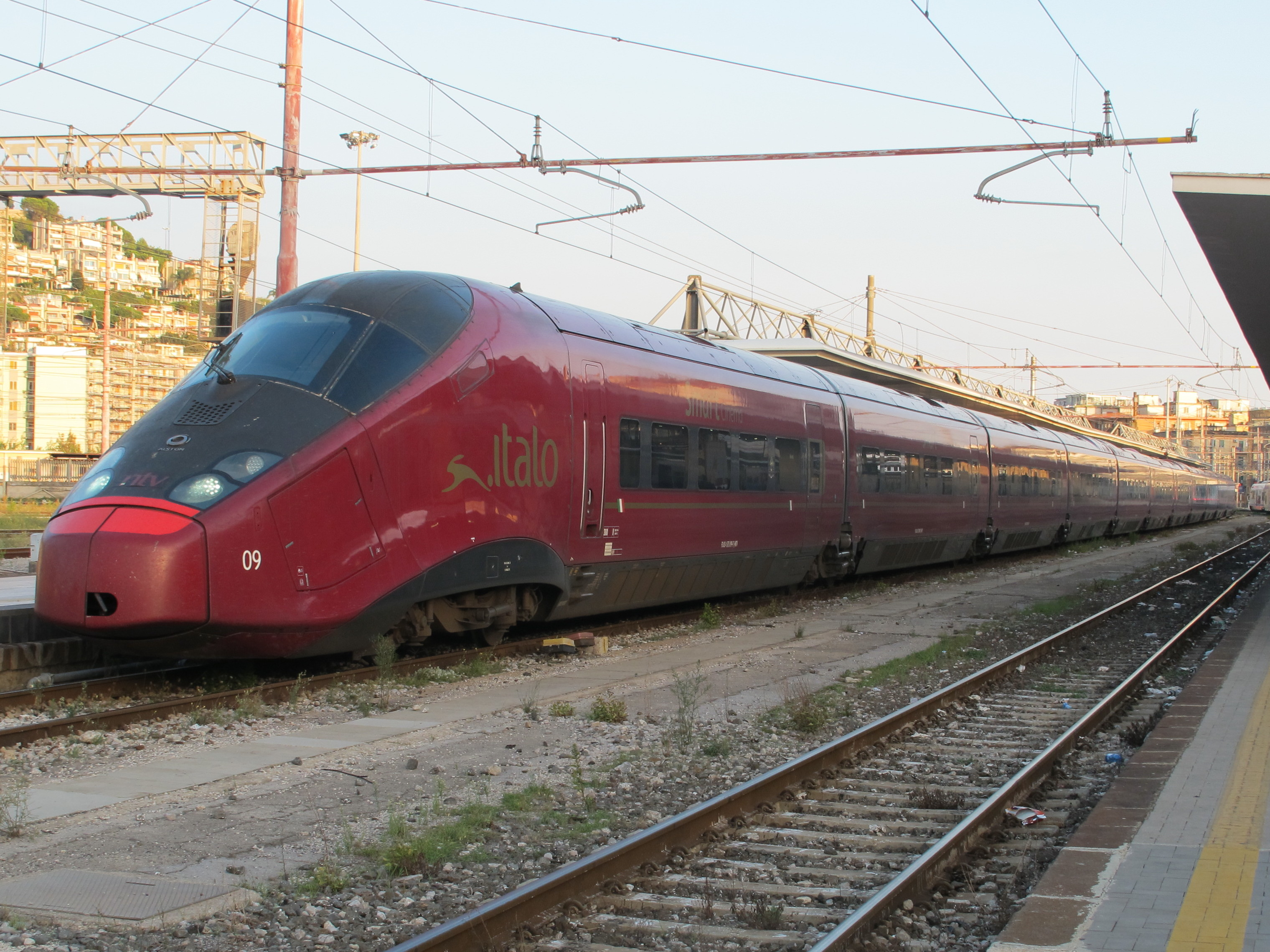 NTV italo AGV 09 (ETR575) in Salerno